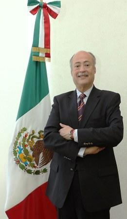 Ruben Beltran Guerrero